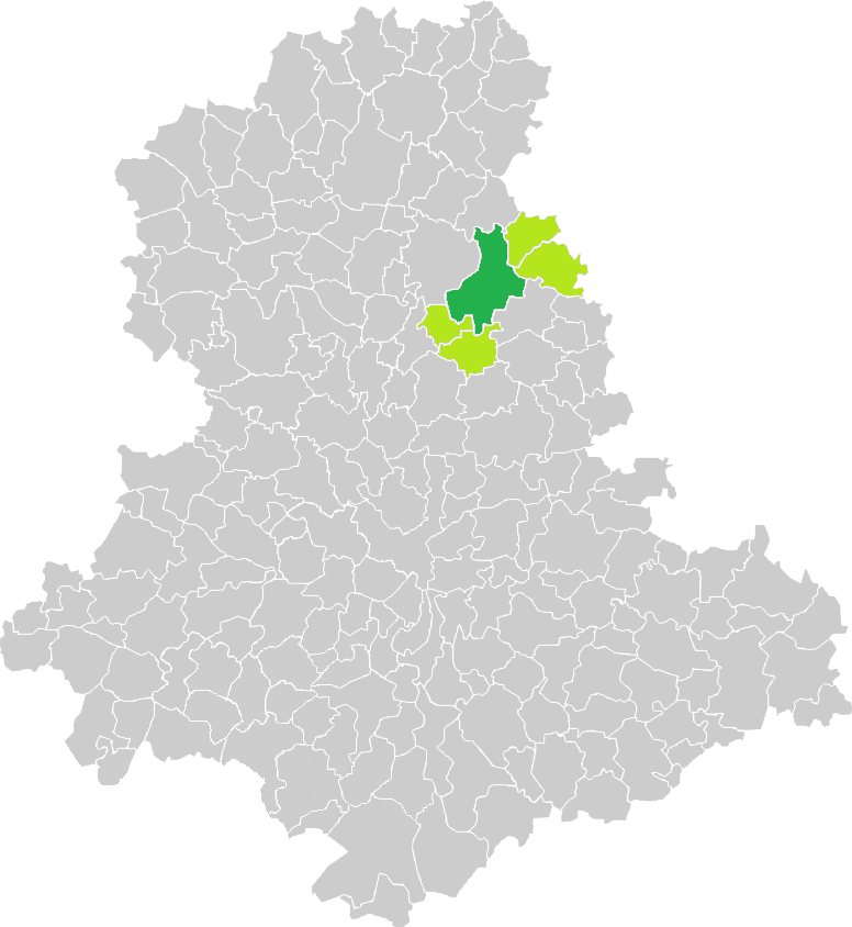 Carte de situation de la commune de Bessines-sur-Gartempe (en vert foncé) dans le votre Canton (en vert clair) sur une carte des communes de la Haute-Vienne